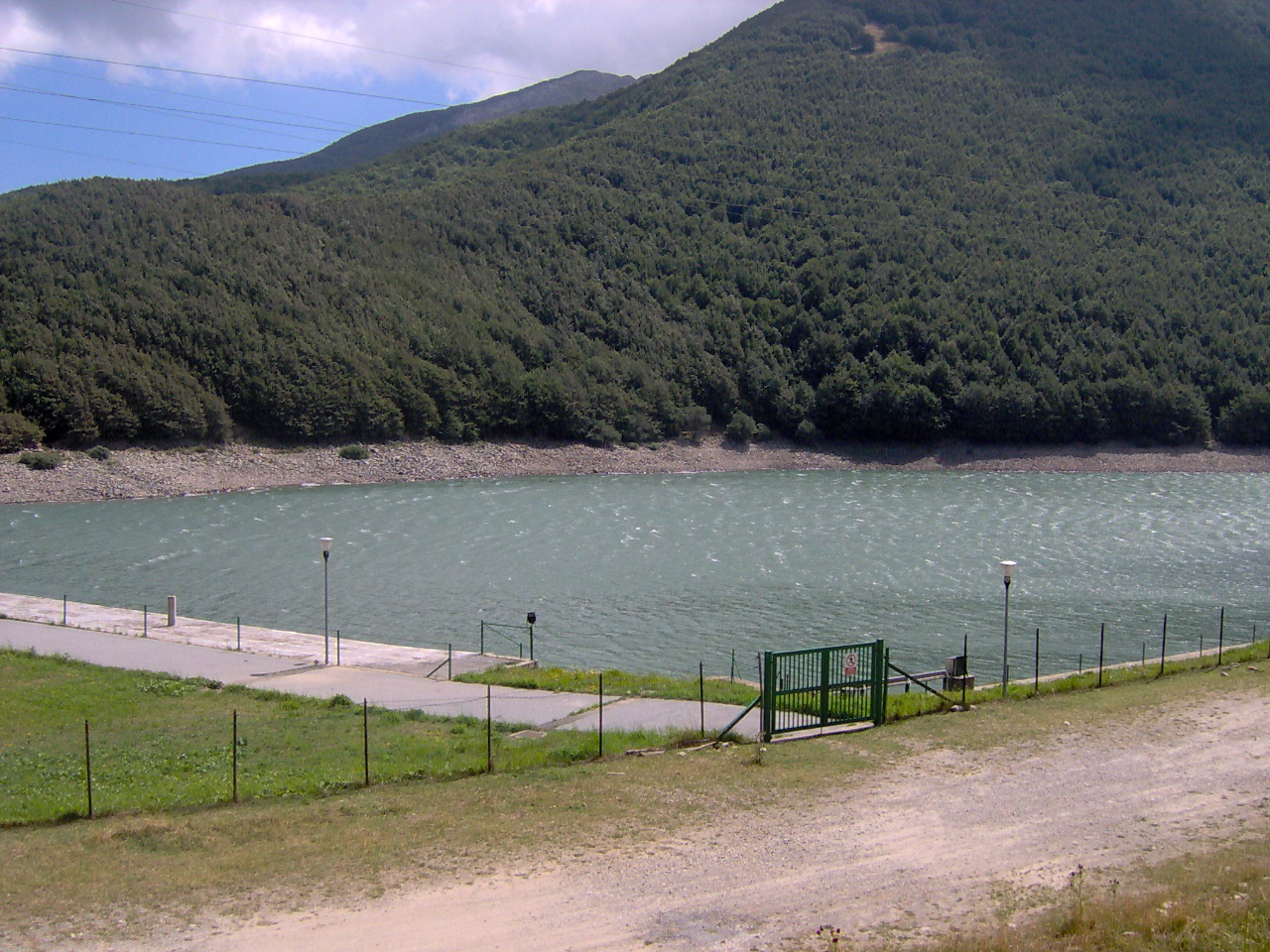 Lago Paduli presso il passo del Lagastrello